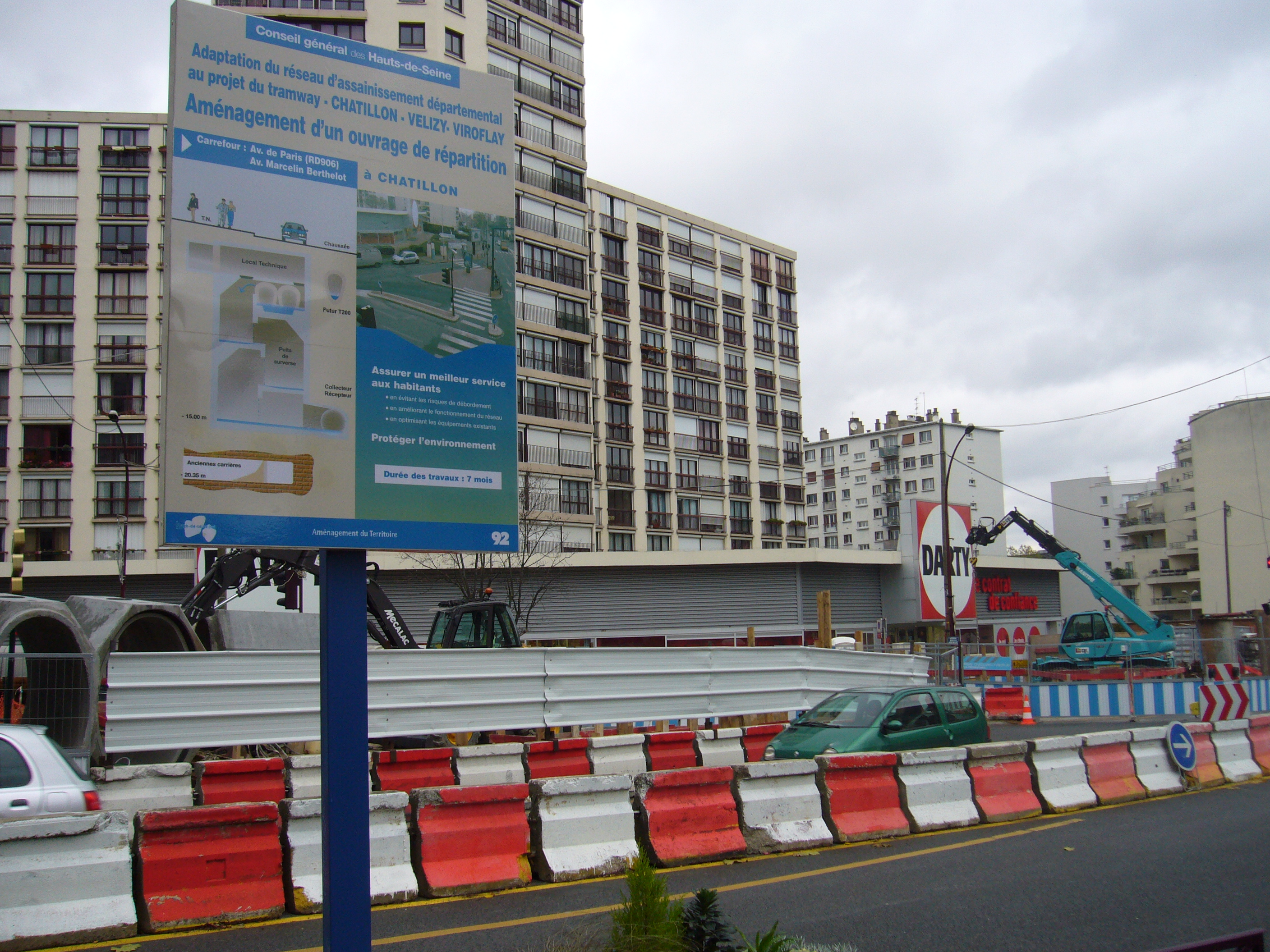 Travaux de voirie en vue de la création du tramway Châtillon - Viroflay.